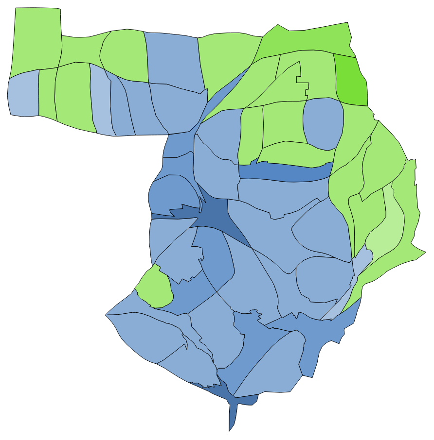 顏色對照表